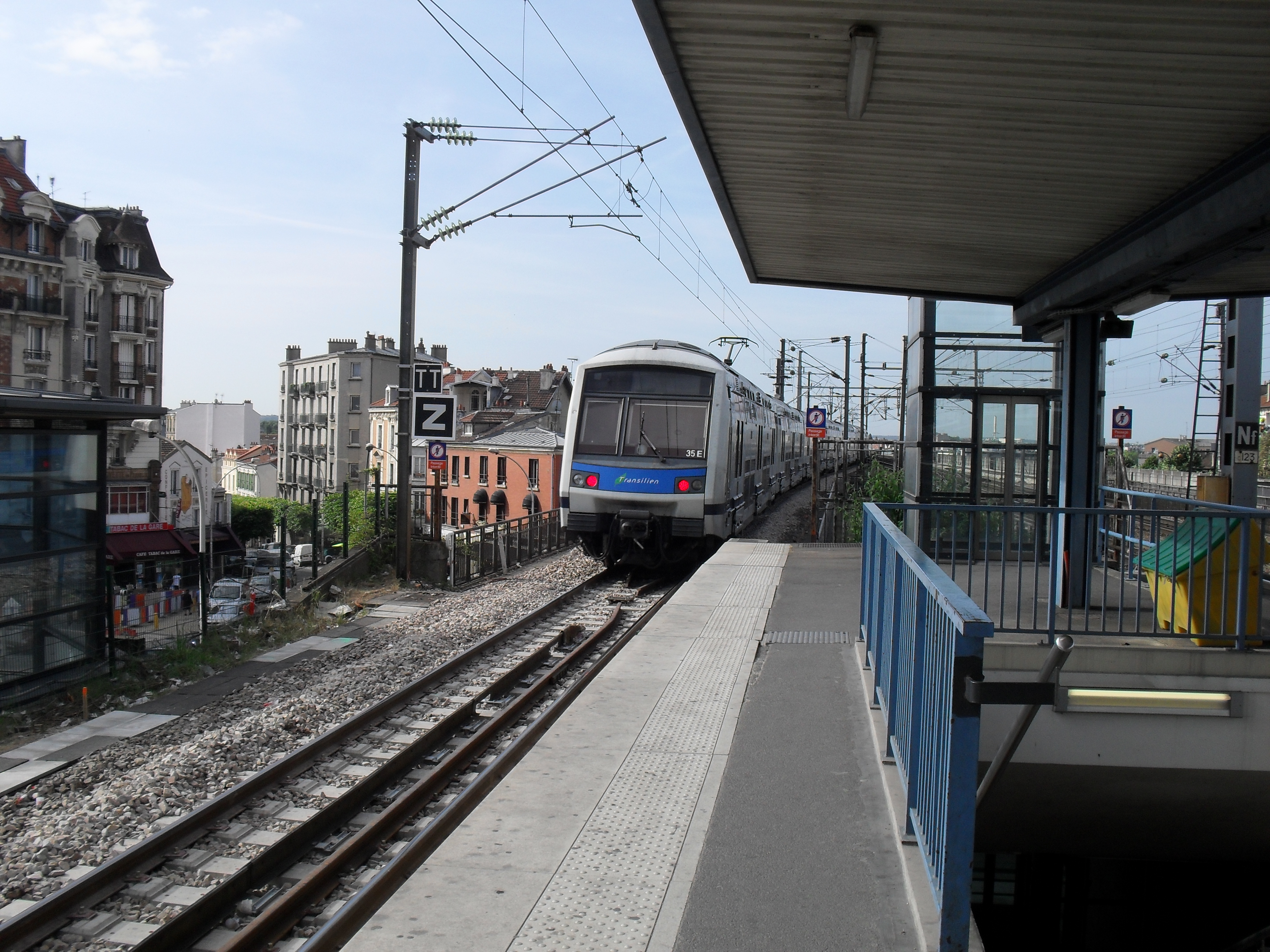 RER E - Gare de Nogent-Le Perreux